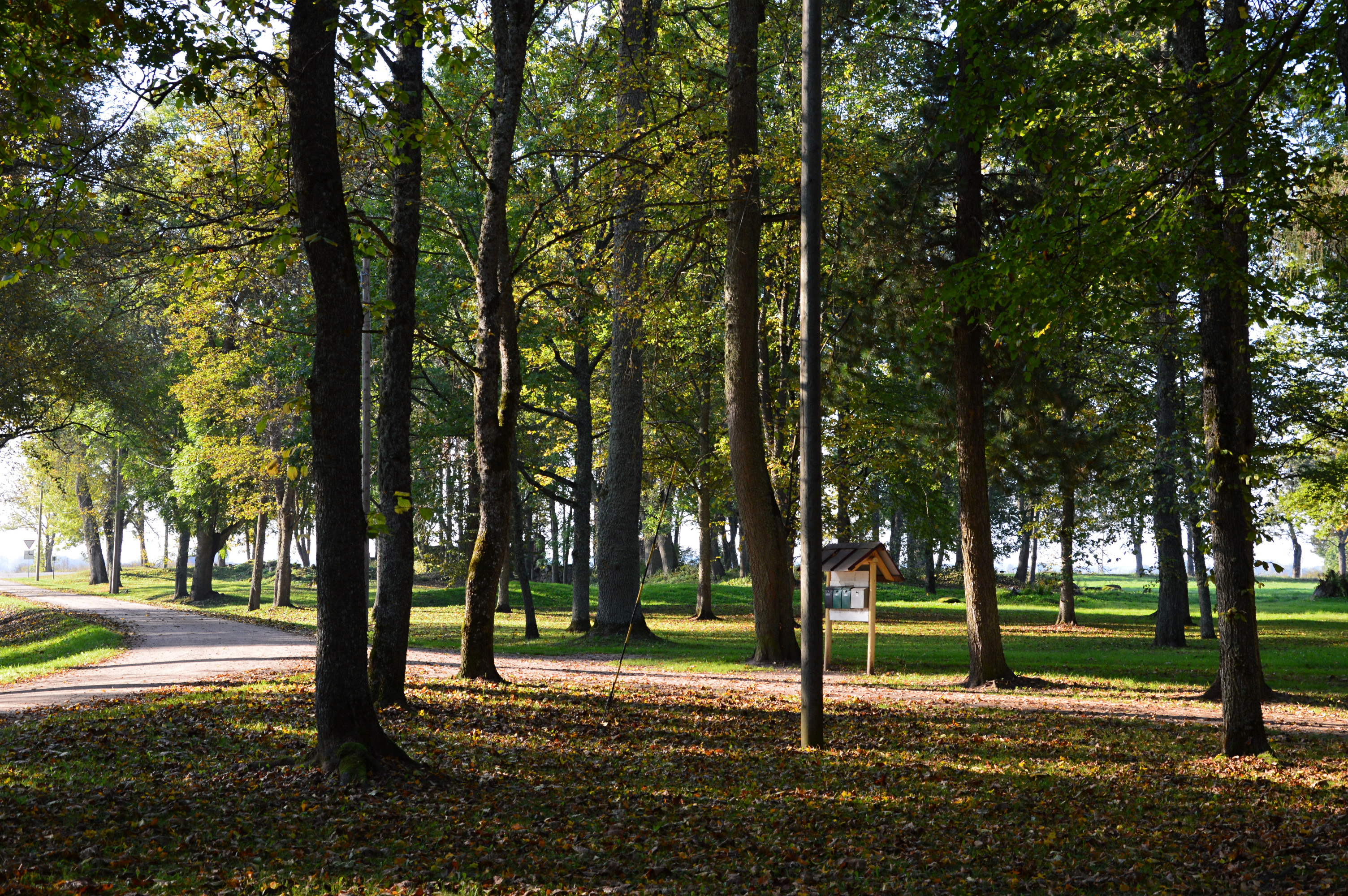 Kastre park